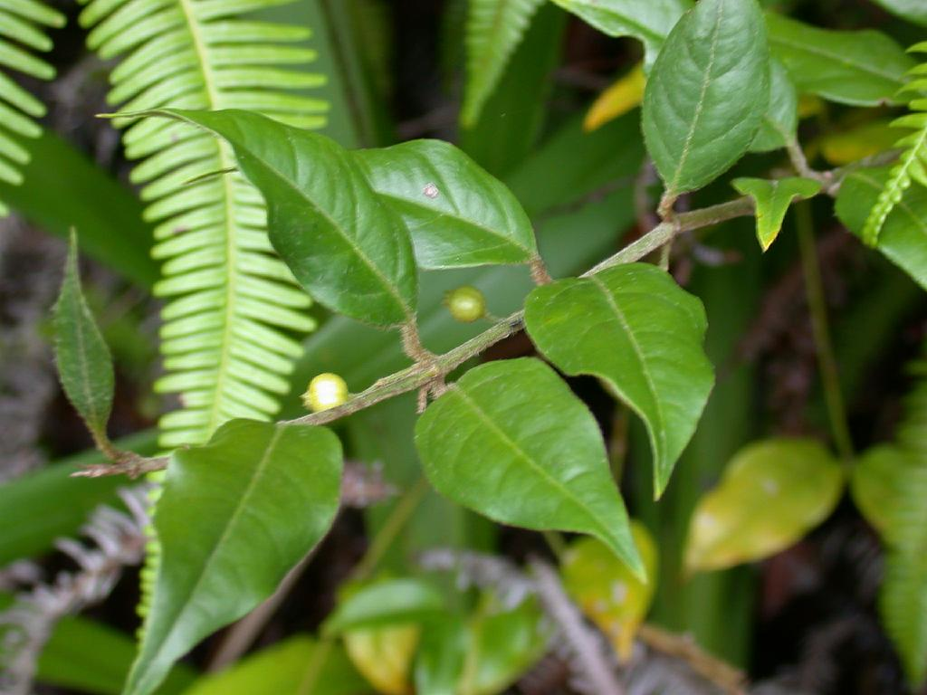 Coptosapelta diffusa：ヒョウタンカズラ 2004/08/11 沖縄本島北部：Okinawa Island Japan